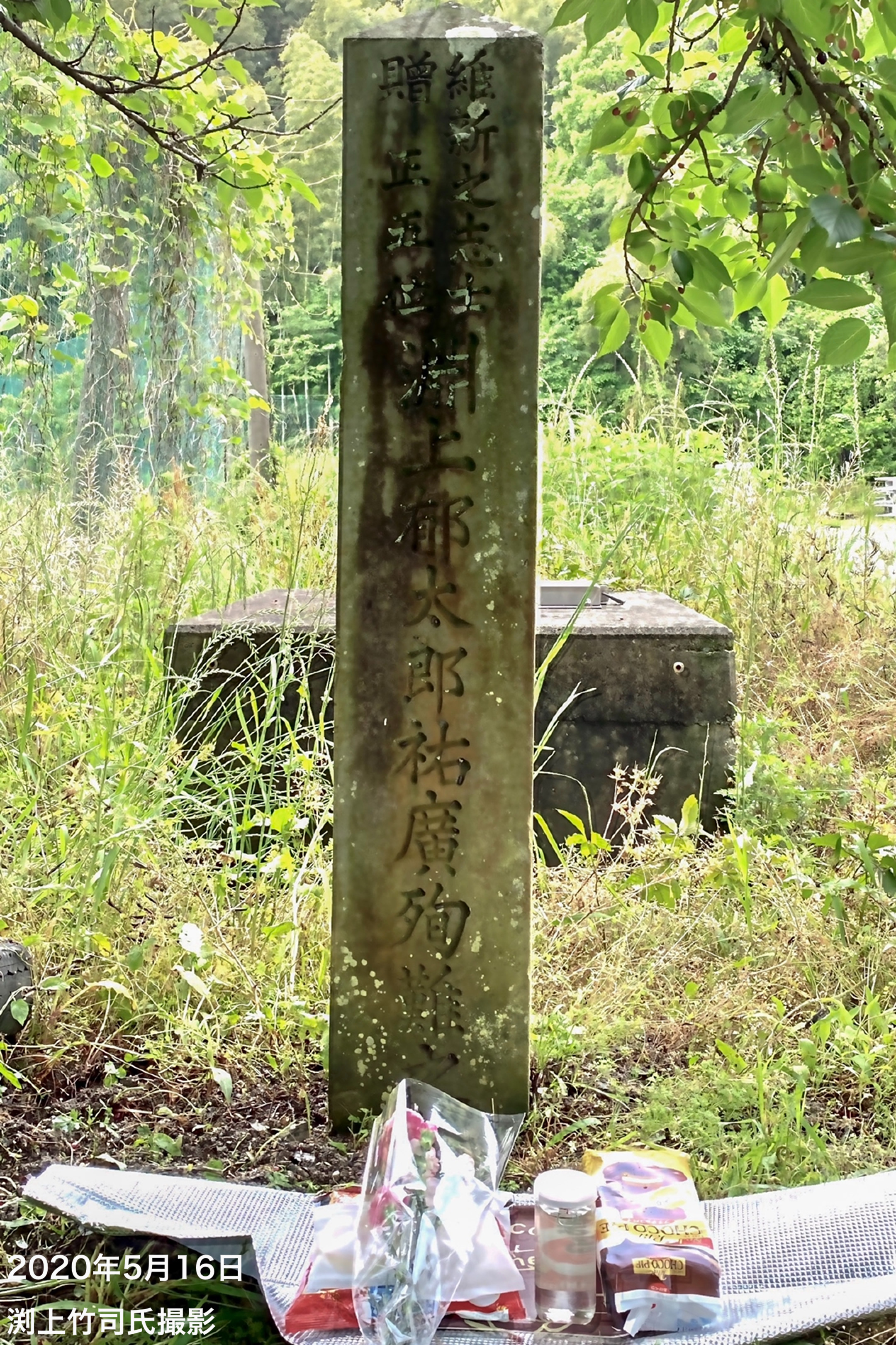 淵上郁太郎殉難の碑